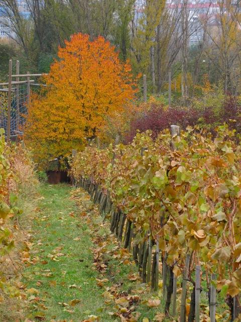 Praha-Vysočany, vinice Máchalka, podzimní pohled